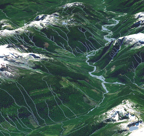 La Squamish et son système hydrographique, au Canada, vue du nord. À gauche, le mont Cayley.